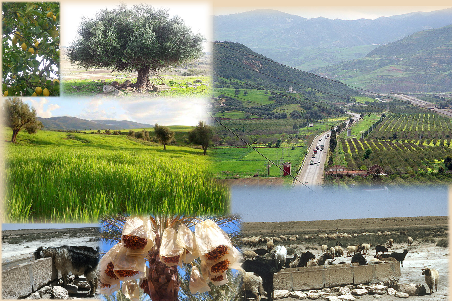 Différentes productions agricoles d'Algérie - Composition à partir de photos issues de Wikimedia Commons